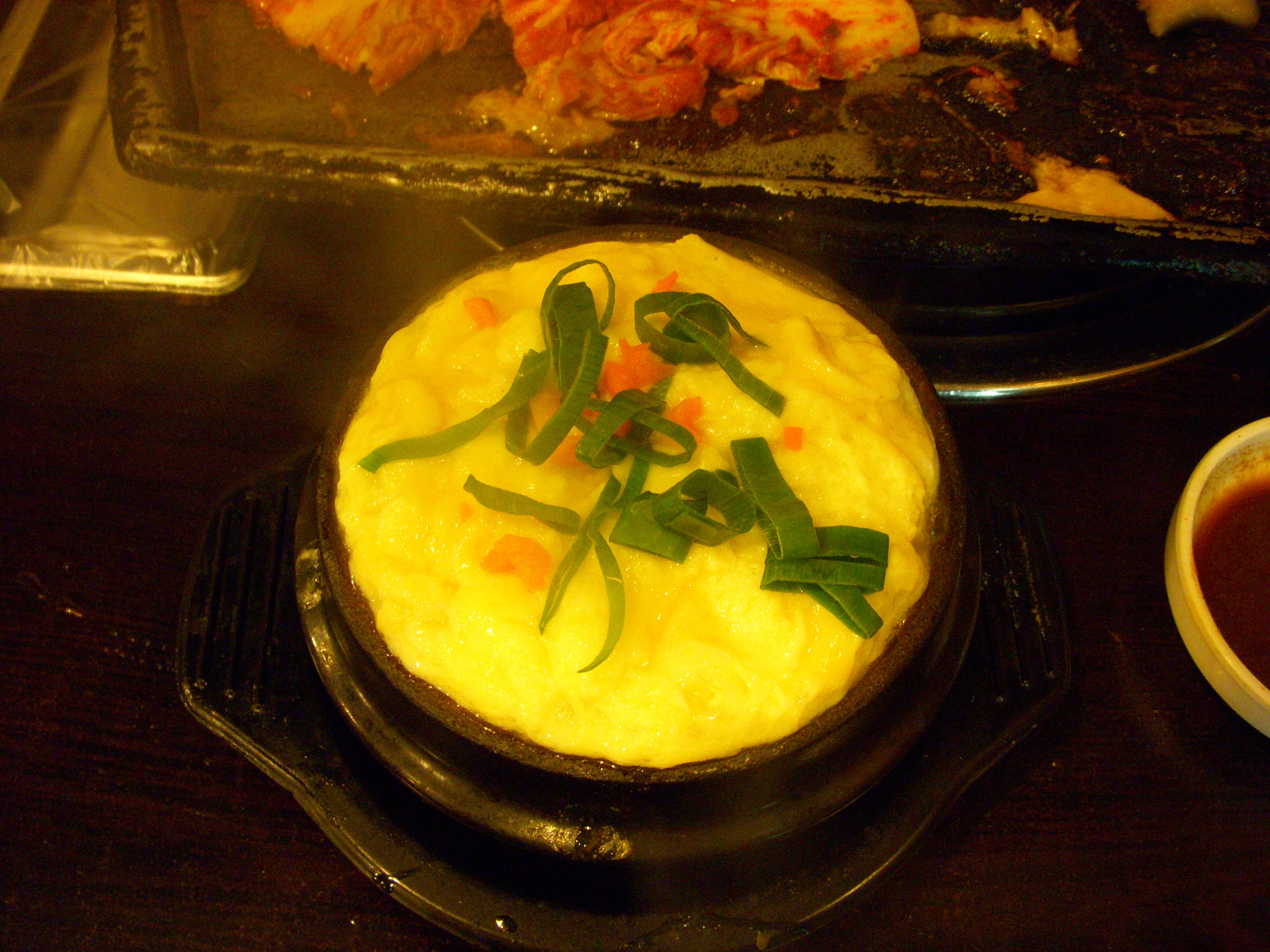 Korean cuisine